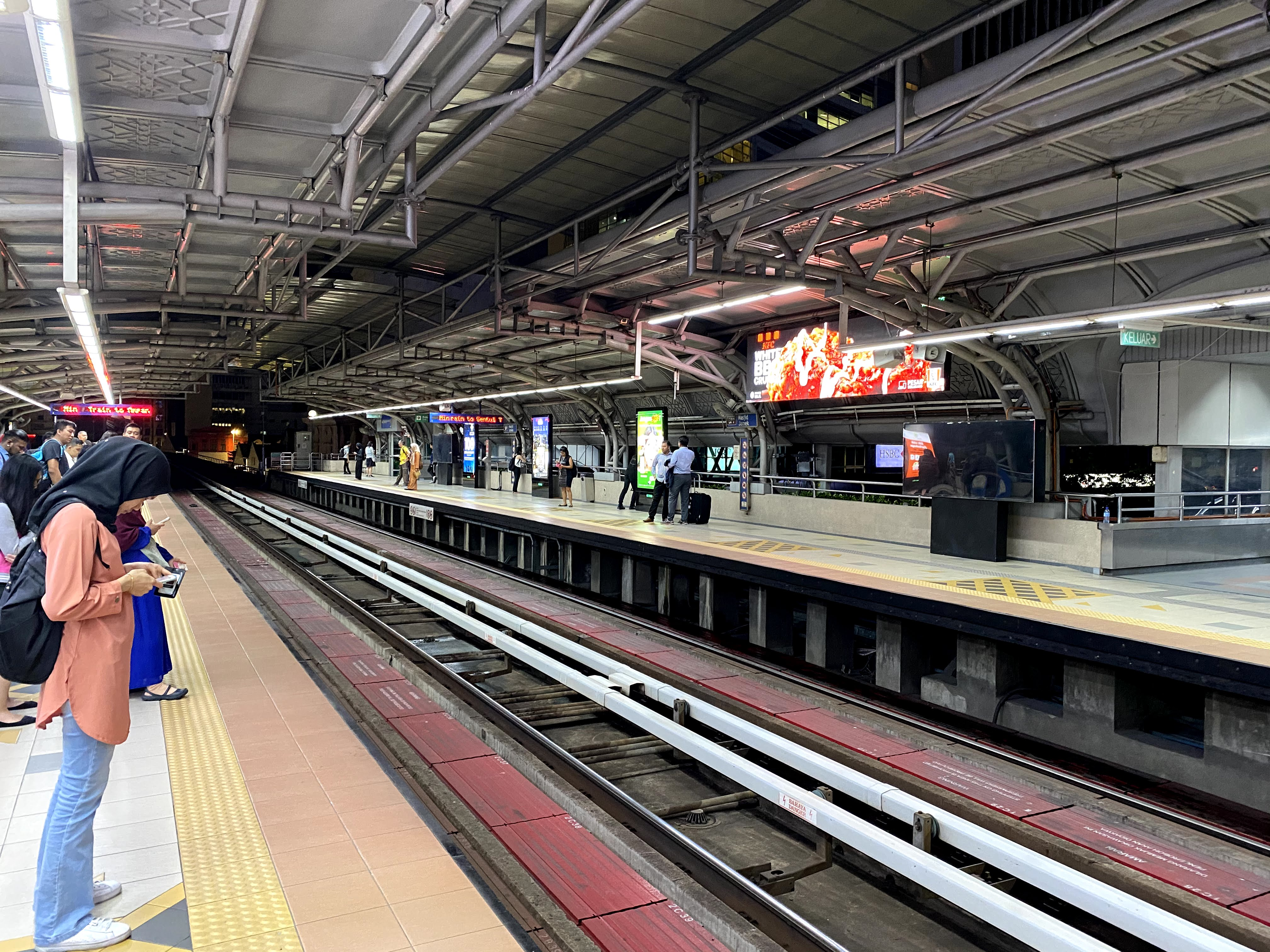 中文（台灣）: 占美回教堂站安邦線月台